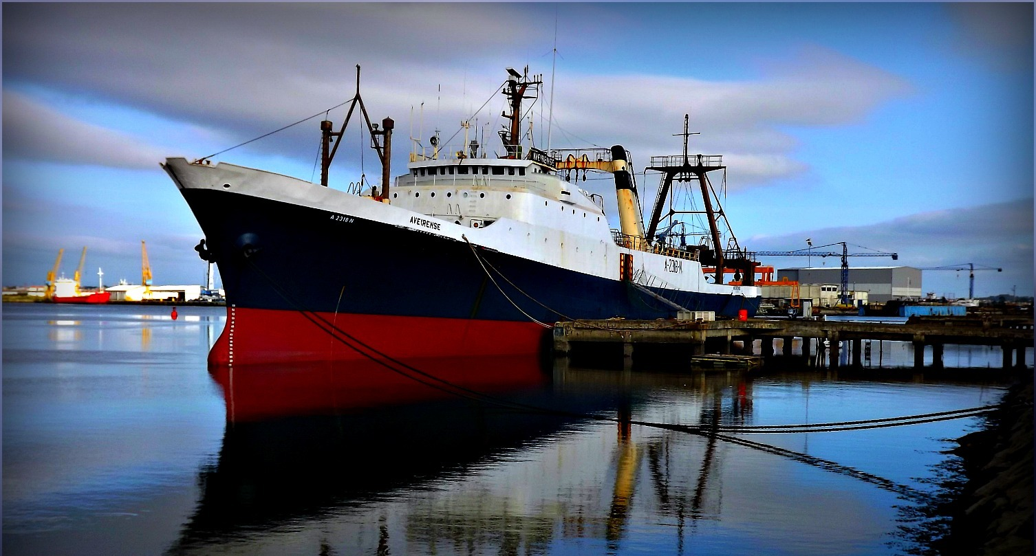 Barco de Pesca do Bacalhau atracado na Gafanha da Nazaré-Portugal